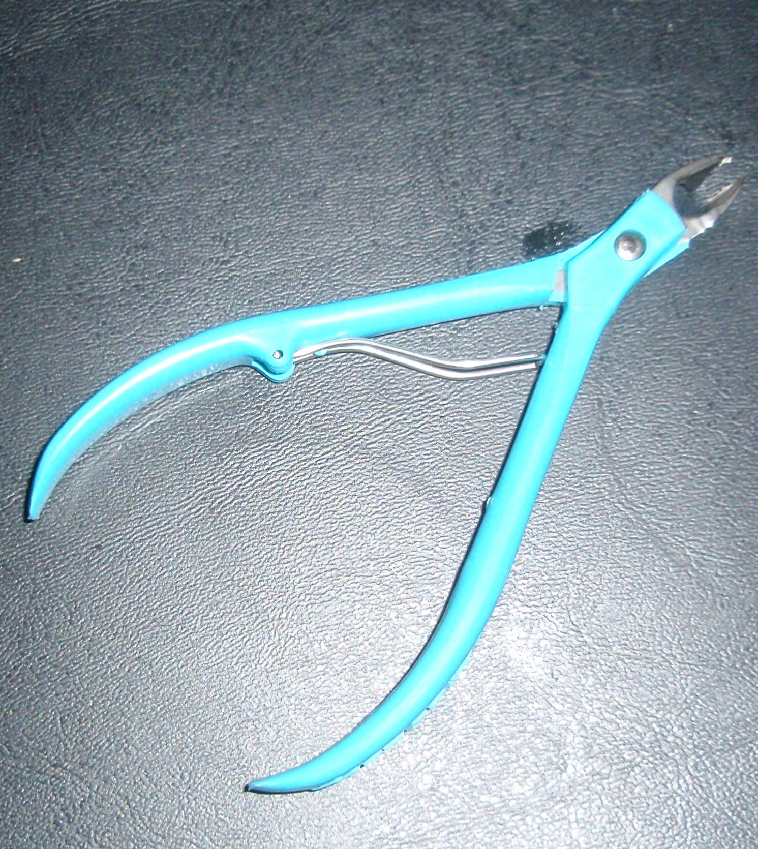 Cuticle Cutter